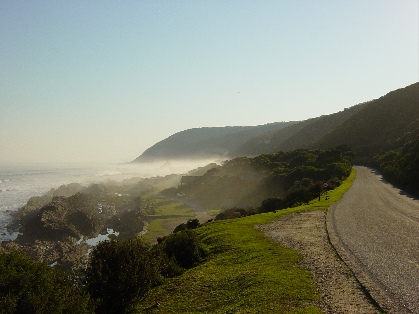 Tsitsikamma afternoon